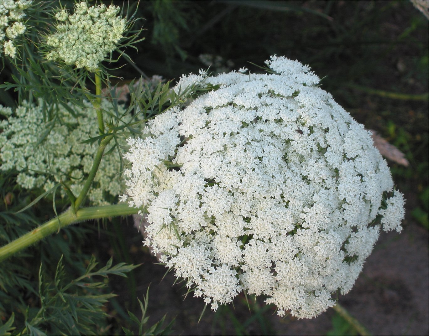 (nl: Wortel bloeiwijze) Daucus carota